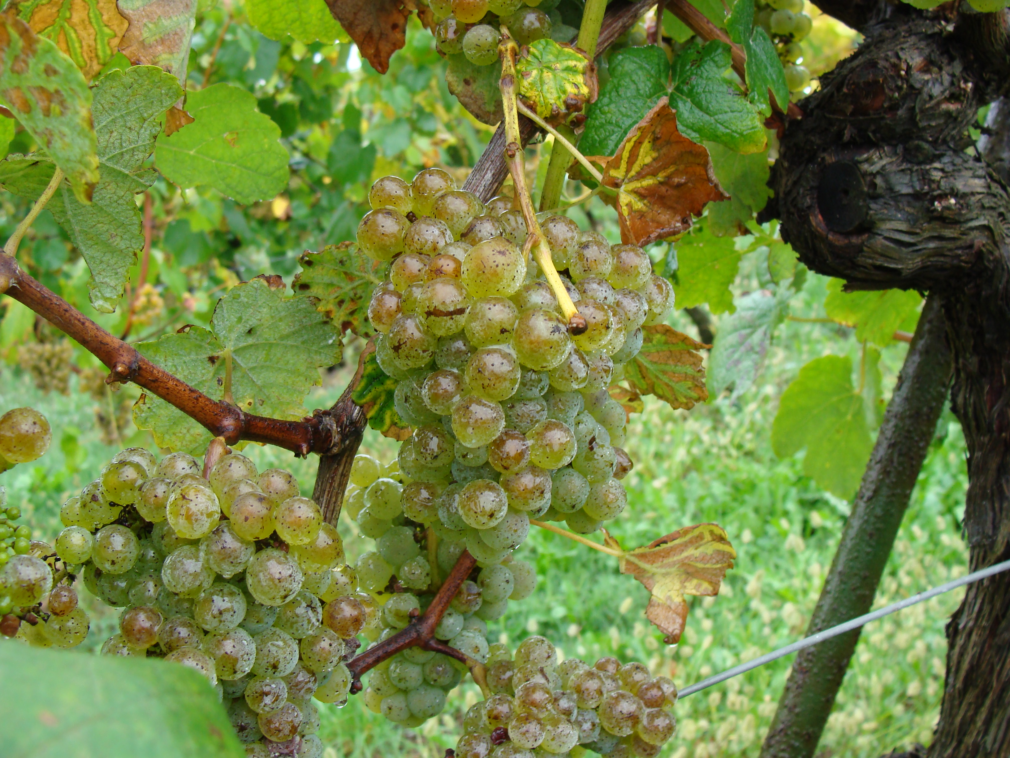 Bizkaiko Txaakolinako mahastiko mahats mordo eder bat